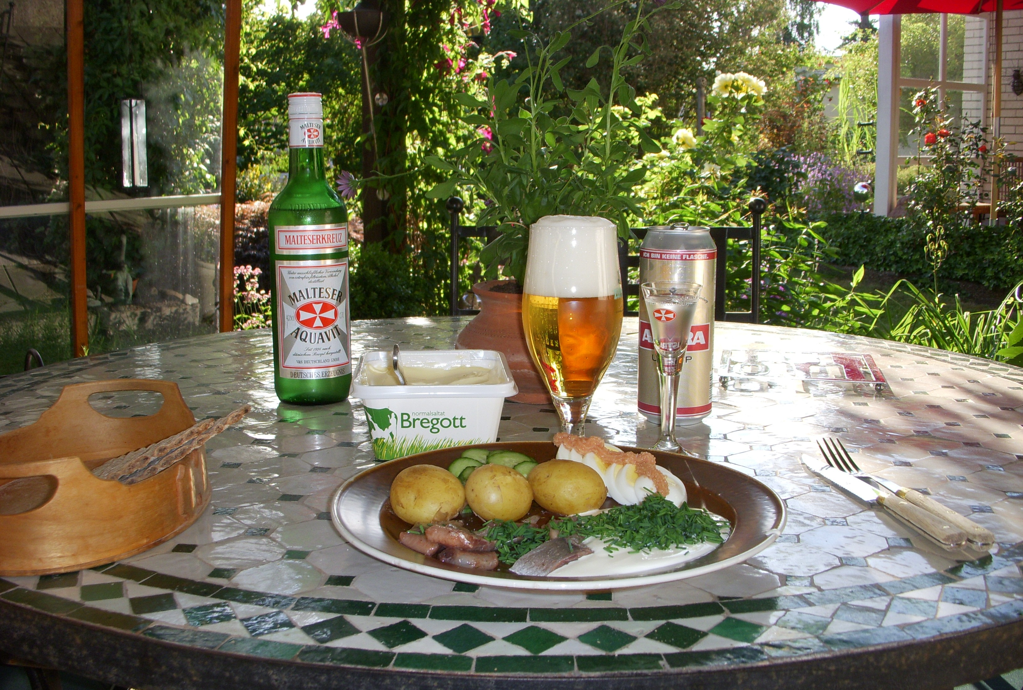 Matjessill med färskpotatis, ägg och gräddfil serverat tillsammans med öl och snaps